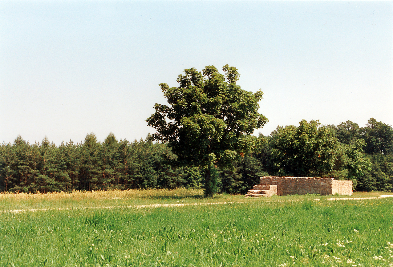 Obergermanisch-Rätischer Limes, Wp 14/17, restauriertes Steinturmfundament mit Limesmaueransatz.